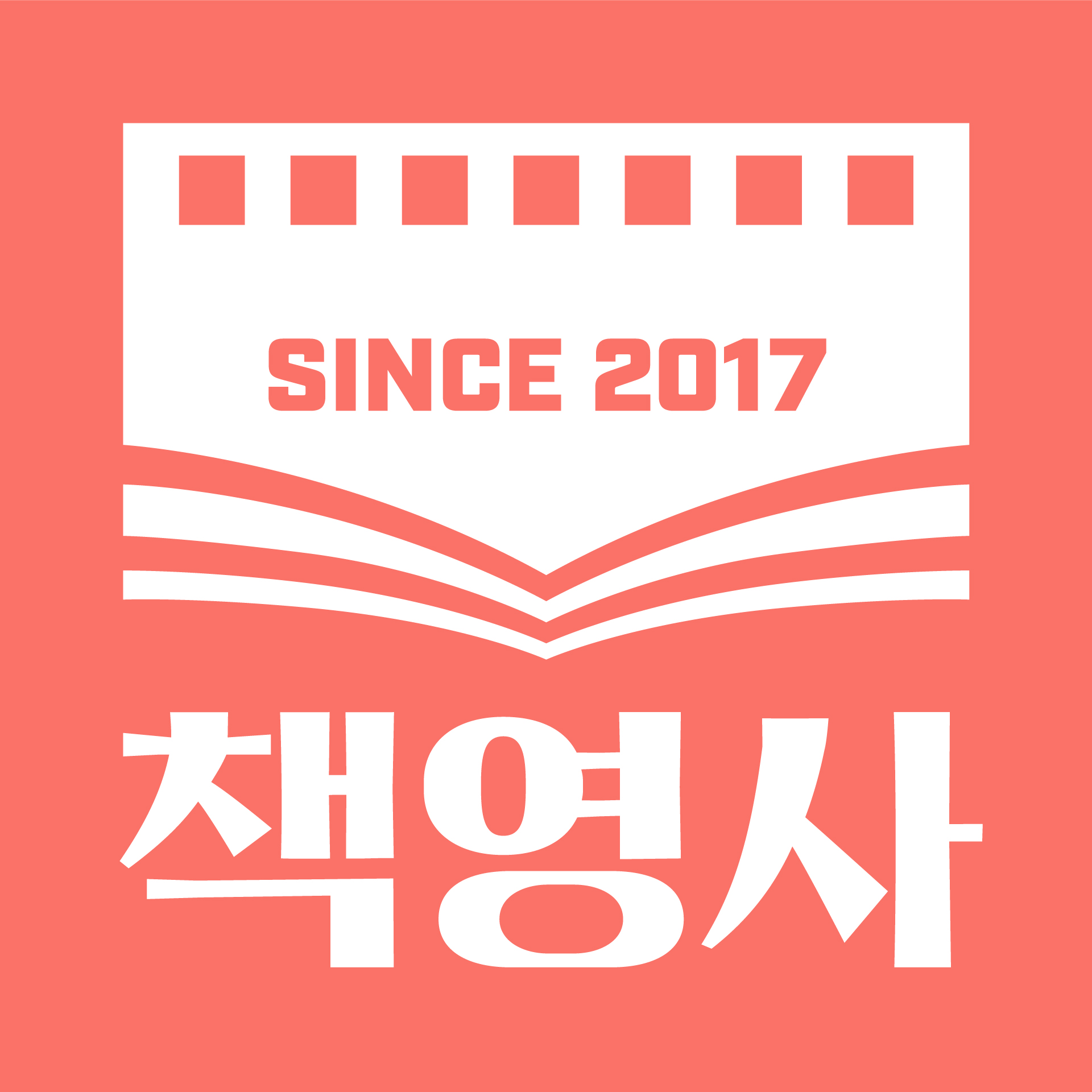 책과 영화 사이